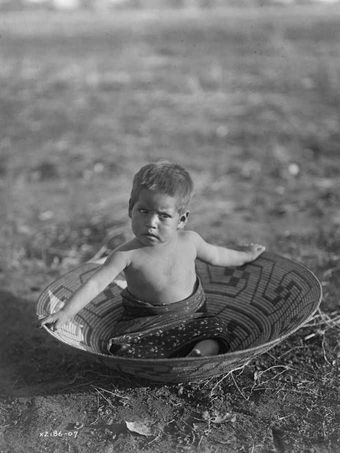 Maricopa child